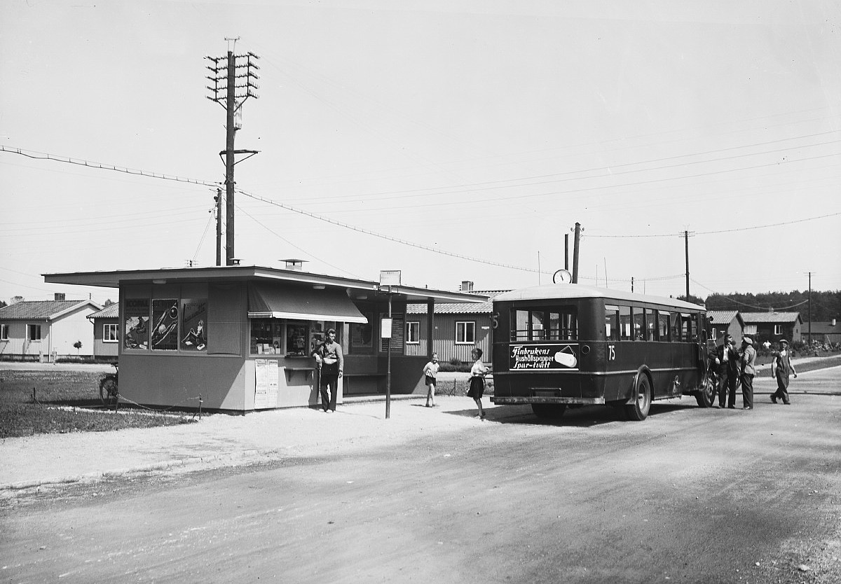 Tallkrogen, busshållplats Lingvägen - Victor Balcks väg. Buss på linje 75 (bussen står på Lingvägen)